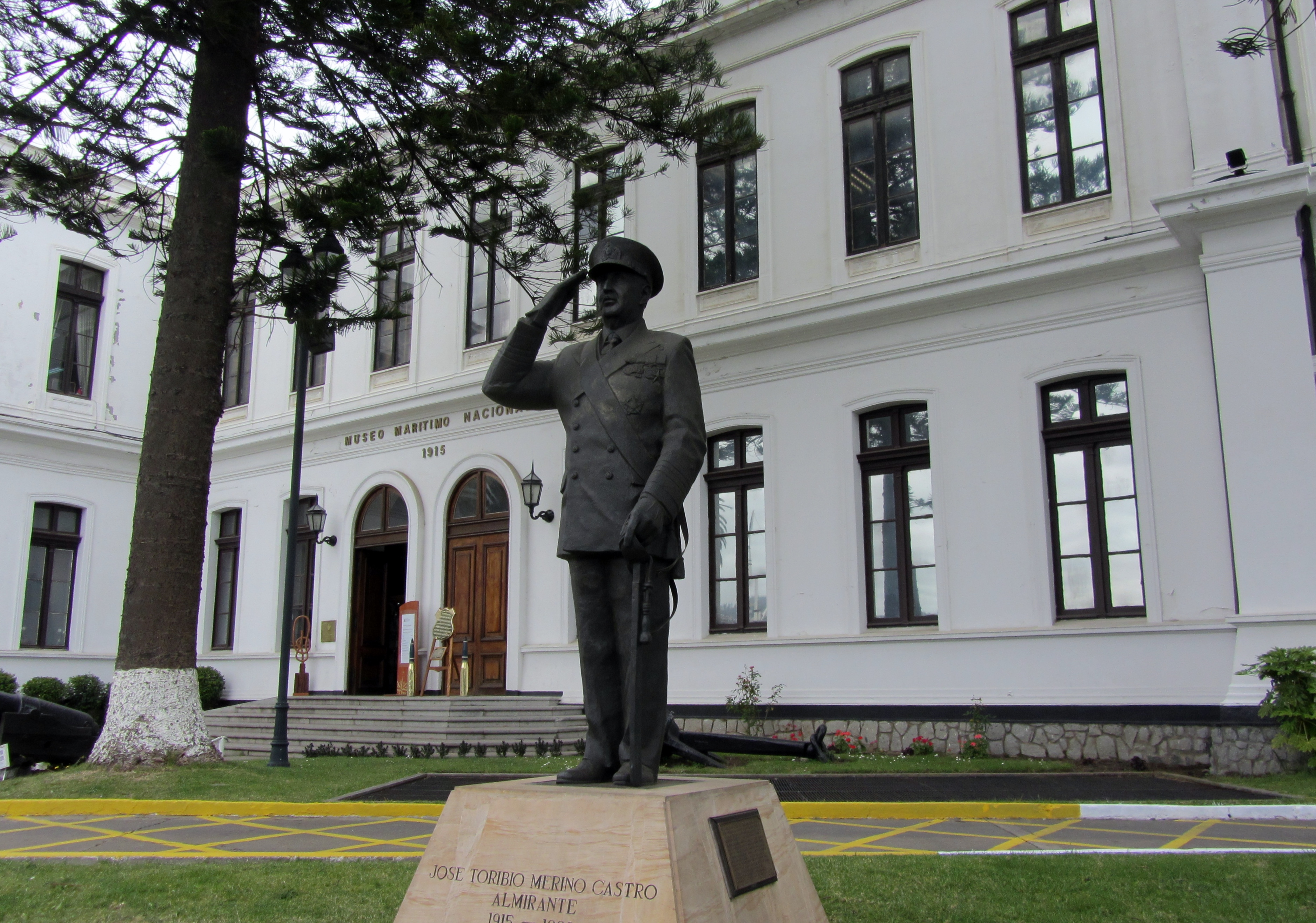 Estatua del almirante José Toribio Merino, diagonal a la entrada del Museo Marítimo Nacional, en el cerro Artillería de Valparaíso. La escultura de 3 metros (bronces y piedra) es obra del escultor chileno Arturo Hevia.